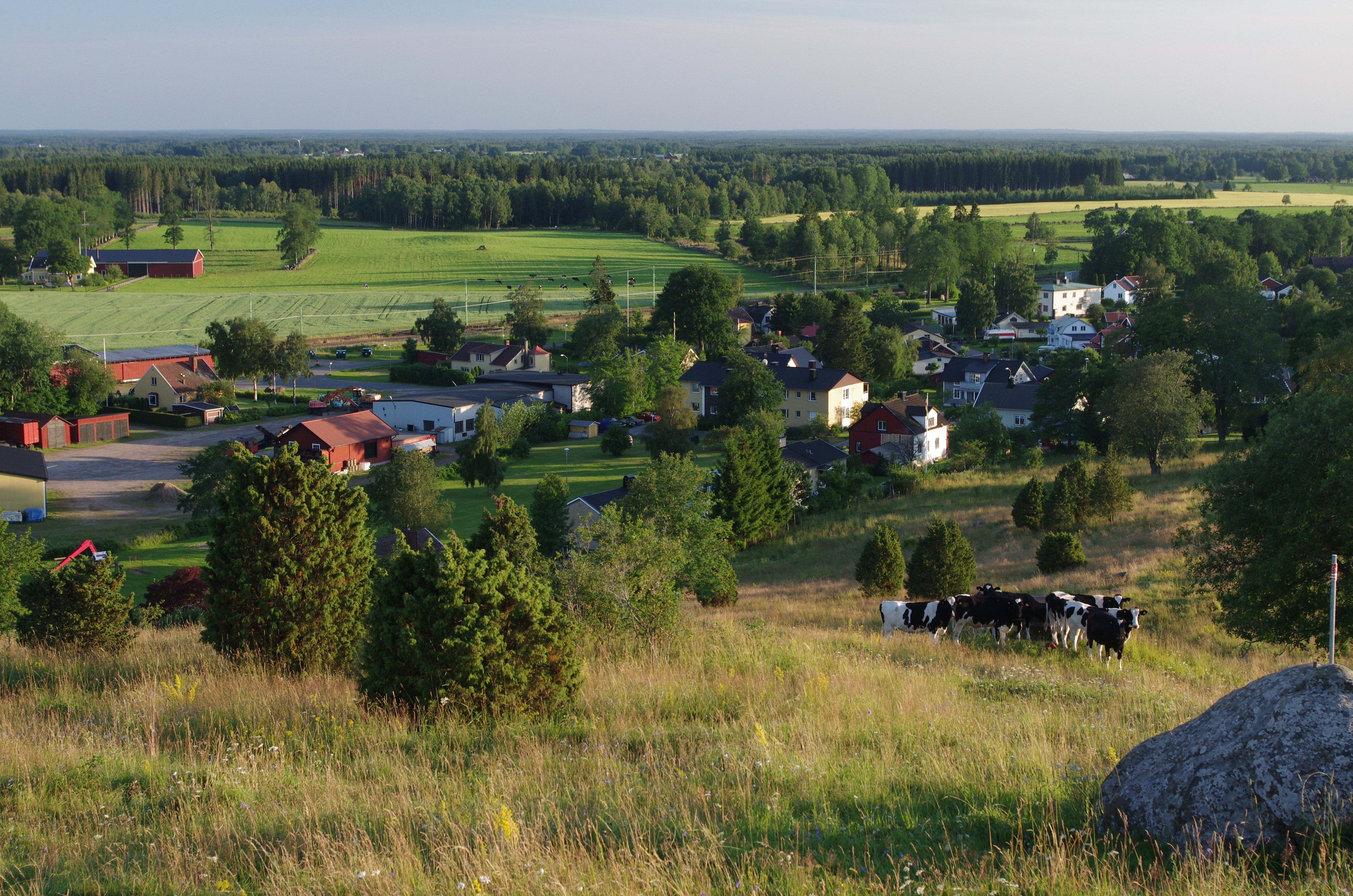 Odenskulle, en tätort i Falköpingskommun. Fotot är taget från den hedniska kultplatsen Odenskulle. Stenen i förgrunden är Älvastenen. Odenskulle har i äldre tider varit en betydelsefull plats. Den 1 november 1561 befallde Erik XIV att Falköping skulle flyttas till Odenskulle. Flytten förbereddes, men nordiska sjuårskriget kom emellan och Västergötland plundrades och brändes av danska trupper, och därefter skrinlades planerna. Ytterliggare tre kungar har besökt Odenskulle under fältmanöver. Karl XV på 1860-talet, Oscar II i slutet av 1860-talet och Gustav V år 1912. På 1700-talet fanns en marknadsplats på Odenskulles väst- och nordsida. Under senare hälften av 1800-talet gick åldermannen varje lördag, under perioden 1 maj - 1 oktober, för att på Odenskulles topp blåsa in helgsmål. Den odalman som inte åtlydde uppmaningen att avsluta arbetet fick plikta 8 shilling till roten. Upprepades förseelsen nästpåföljande vecka så fördubblades böterna. Vid pings och midsommar blåstes det två dagar i rad. Sedan över 100 år tillbaka i tiden har det tänts påskeldar på Odenskulle för att skrämma bort trollpackor och annat otyg, och under 1900-talet för att roa och skapa gemskap. Sedan 1960 tänds årligen en valborgsmässoeld.